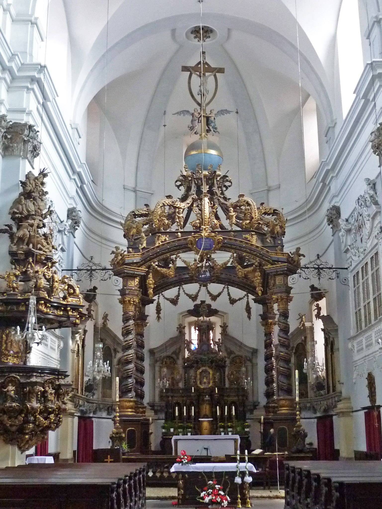 Altar der Basilika in Mariaschein (Bohosudov)